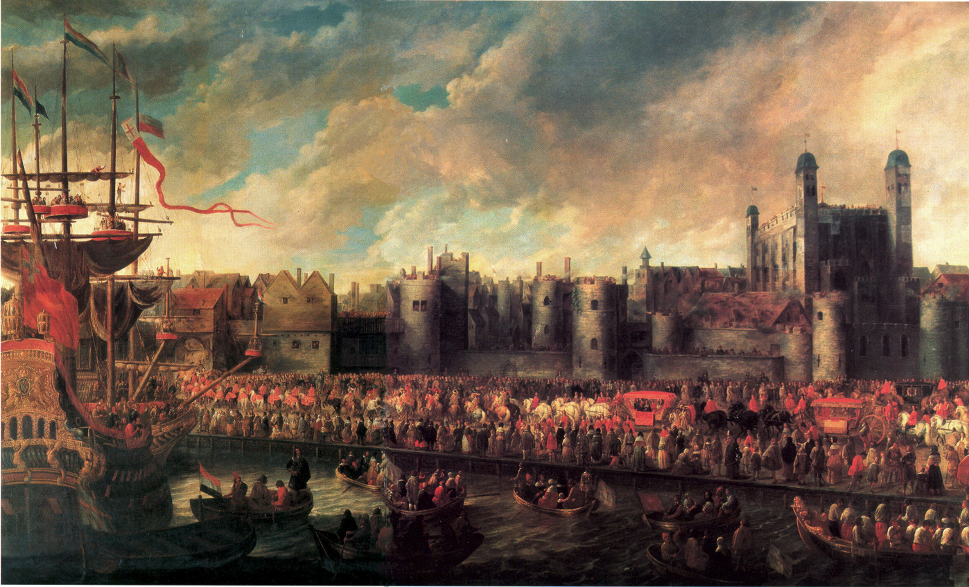 Der Einzug des Prinzen de Ligne in London 1660, Leinwand